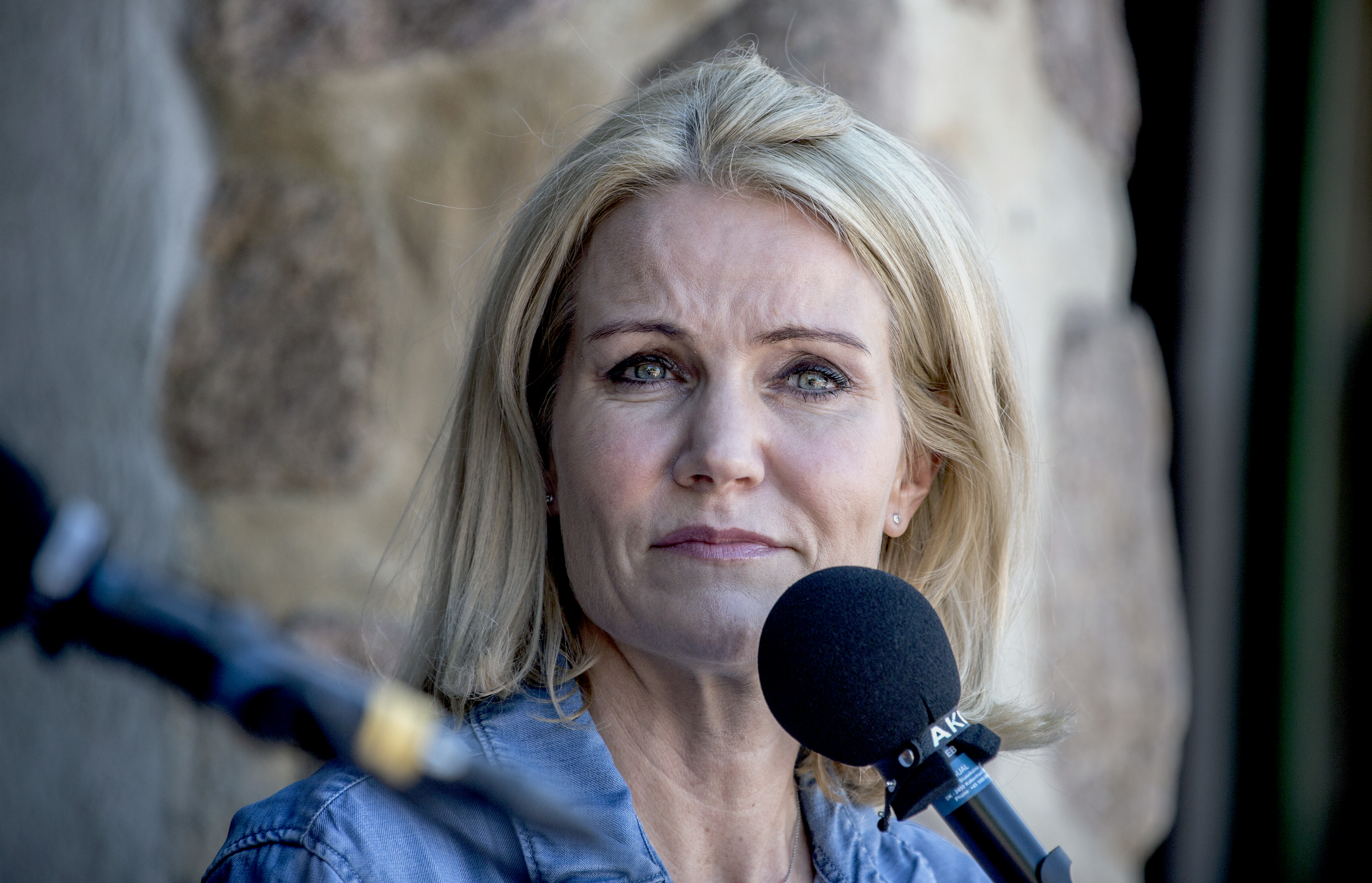 Socialdemokraternes partiledare och statsminister Helle Thorning-Schmidt vid socialdemokraternes egna tal utanför gamla brandstationen i Allinge den 12 juni 2015. Folkemødet på Bornholm 2015 Photo: News Øresund - Johan Wessman © News Øresund(CC BY 3.0) Detta verk av News Øresund är licensierat under en Creative Commons Erkännande 3.0 Unported-licens (CC BY 3.0). Bilden får fritt publiceras under förutsättning att källa anges. The picture can be used freely under the prerequisite that the source is given. News Øresund, Malmö, Sweden. News Øresund är en oberoende regional nyhetsbyrå som är en del av det dansk-svenska kunskapscentrat Øresundsinstituttet.